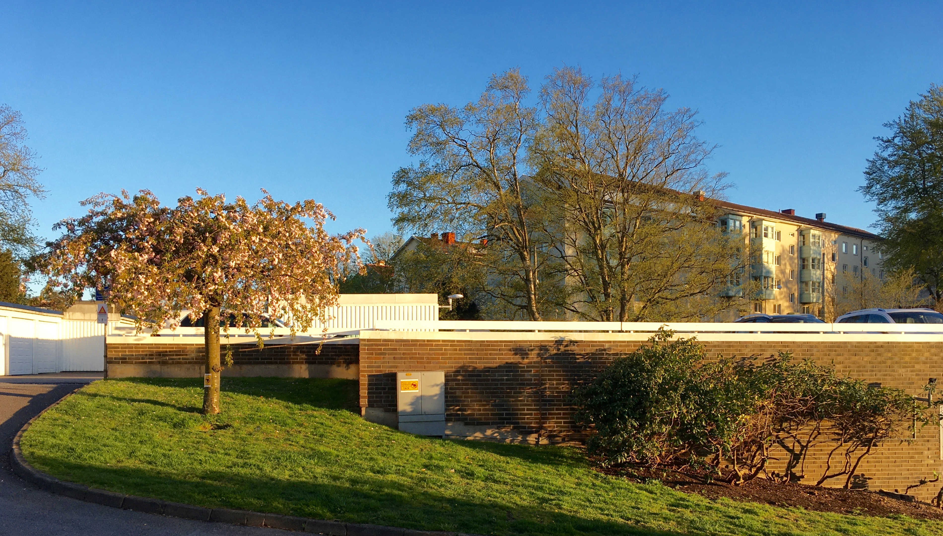 Parkeringsdäcket vid Pauli Backe gränsar till kolerakyrkogården i Lunden, Göteborg. Begravningsplats, L1969:688.